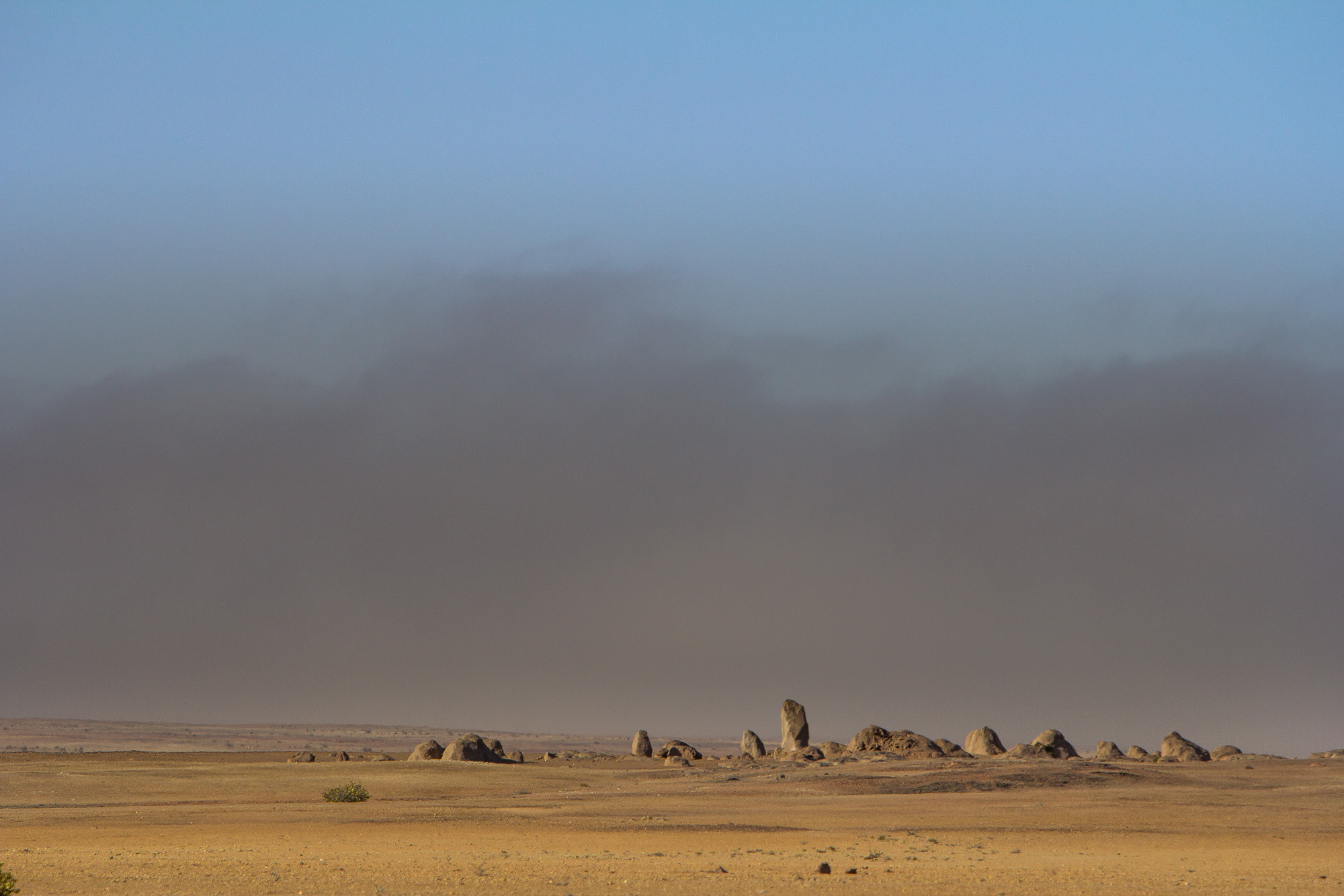 Nebel in der Namibwüste